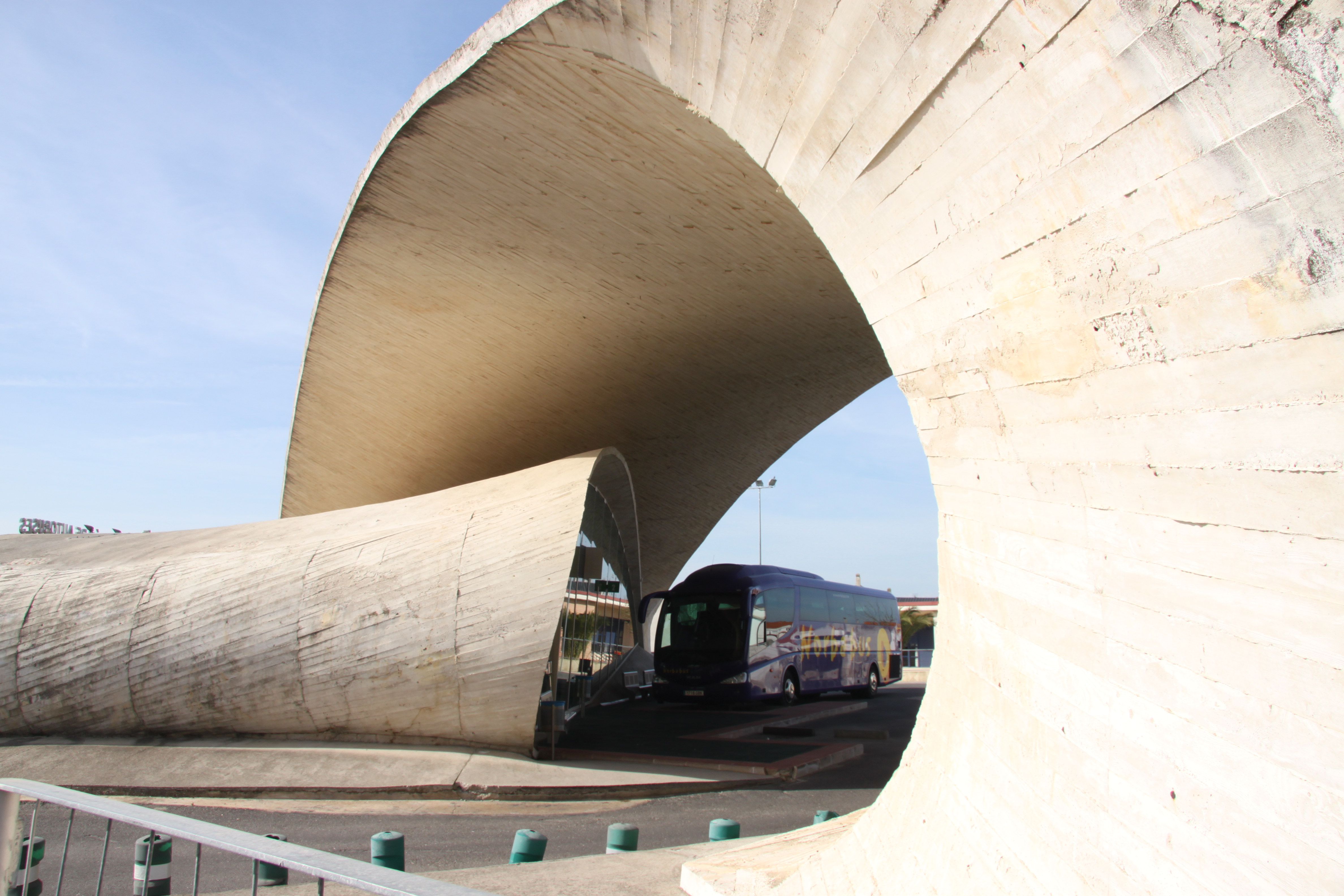 Estación de autobuses de Casar de Cáceres, provincia de Cáceres, España.